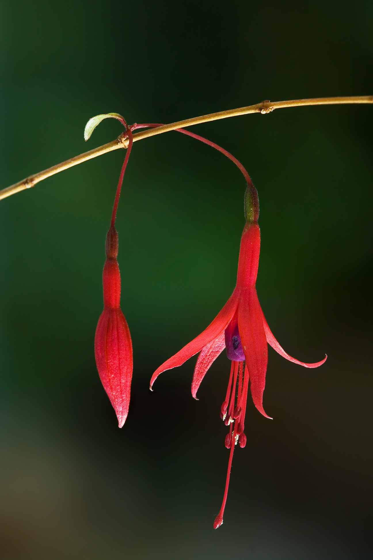 1.2 only